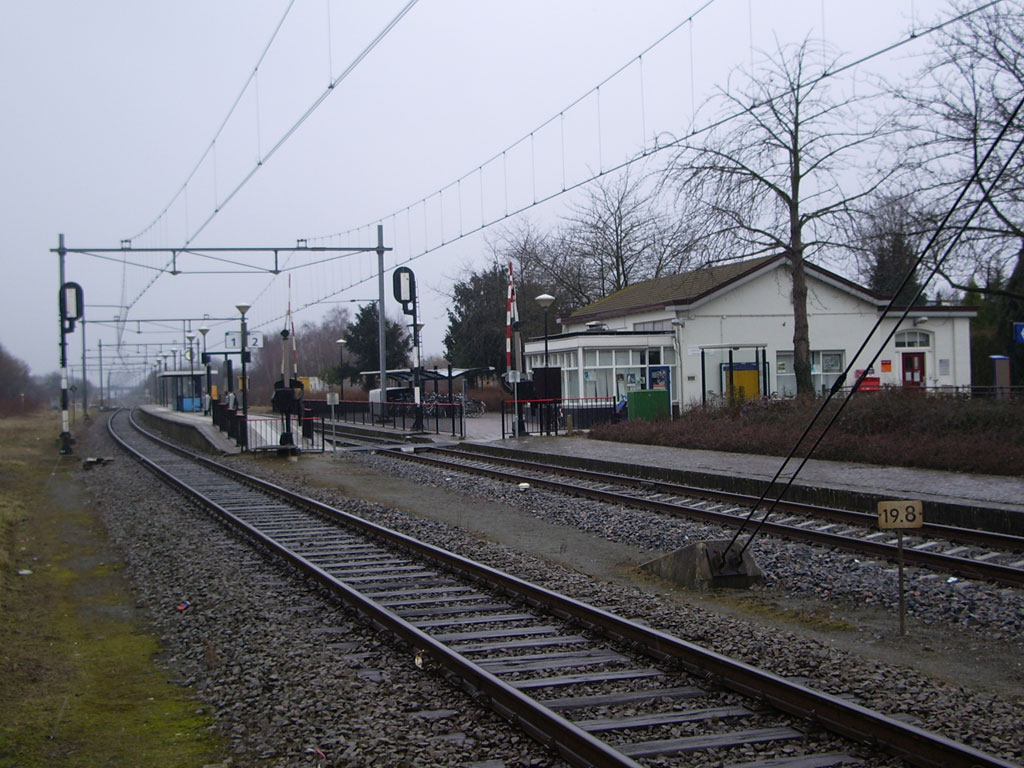 Station Eijsden, het meest zuidelijk station in Nederland.